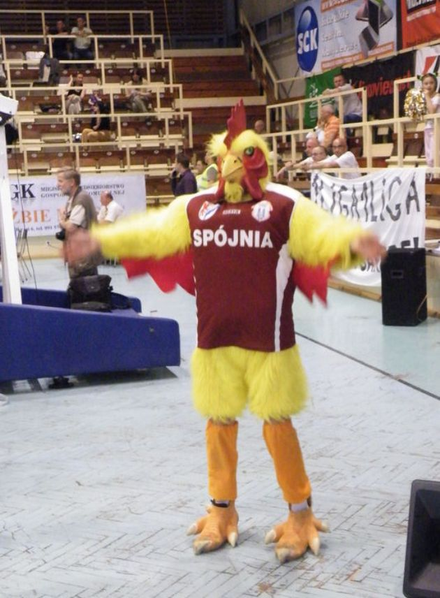 Stargard Szczeciński, 2009r. Maskotka Spójni Spójniaczek